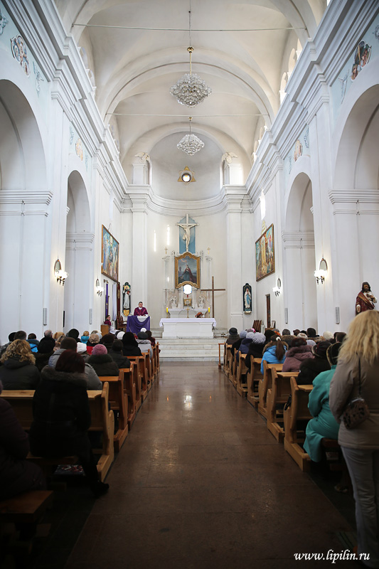 Віцебск.